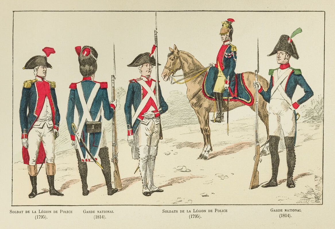 Planche en couleurs "Soldat de la Légion de Police (1795) - Garde National (1814) - Soldats de la Légion de Police (1795) - Garde National (1814)". Dimensions : 19 cm x 28 cm. Illustration extraite de l'ouvrage d'Alfred Rey et Louis Féron, Histoire du corps des gardiens de la paix, 1896.